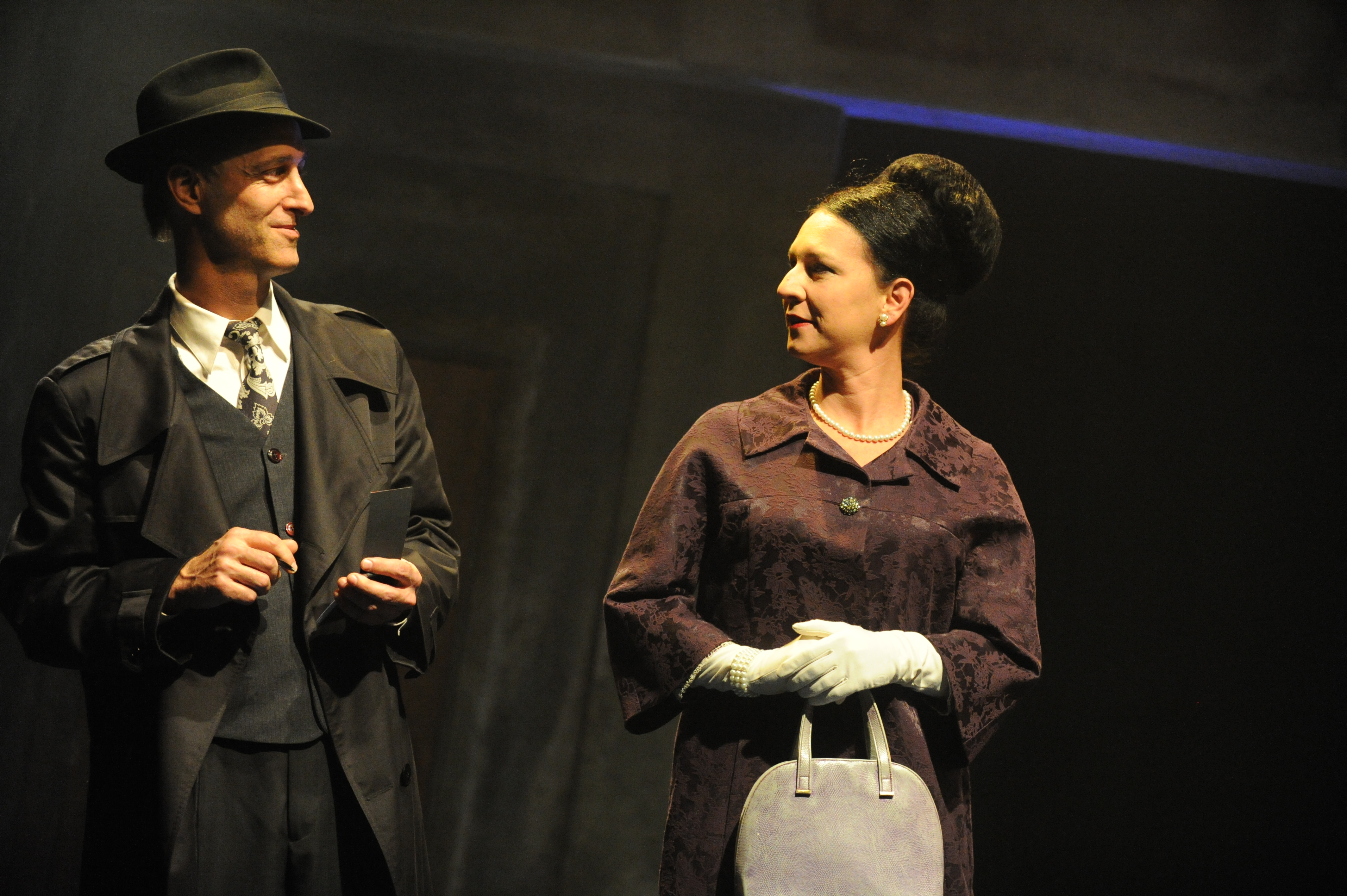 עירית פשטן וארז שפריר, בהצגה "חוקר פרטי", מאת ובבימויו של מיקי גורביץ', תיאטרון החאן, 2011